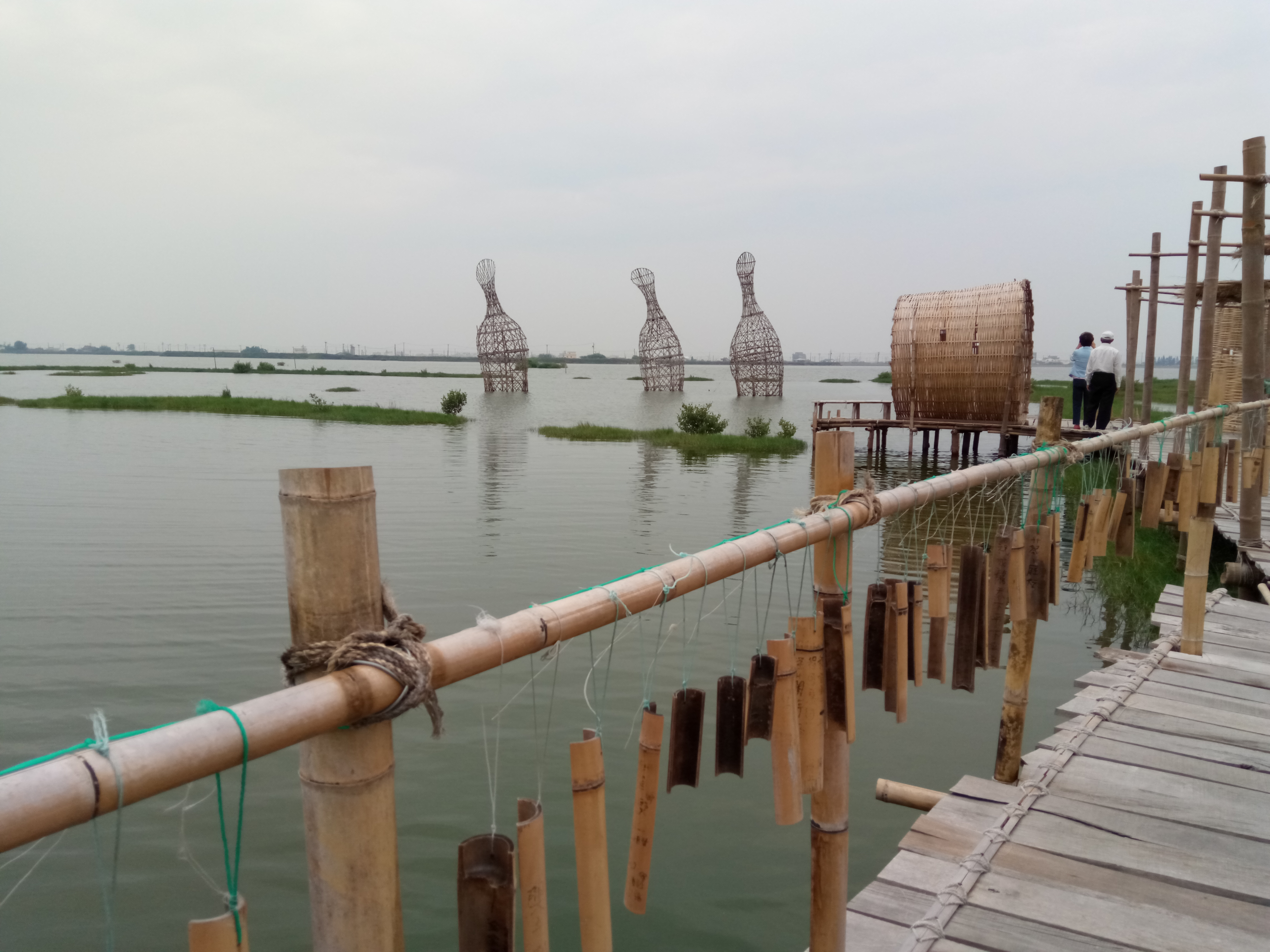 Sharp Z2 實拍